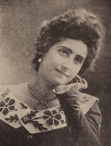 Delia Ducoing de Arrate, conocida en el mundo de las letras como Isabel Morel, dirigió el periódico Nosotras (Valparaíso, 1931-1935) y la revista Familia (Santiago, 1935-1940) en el año 1939.